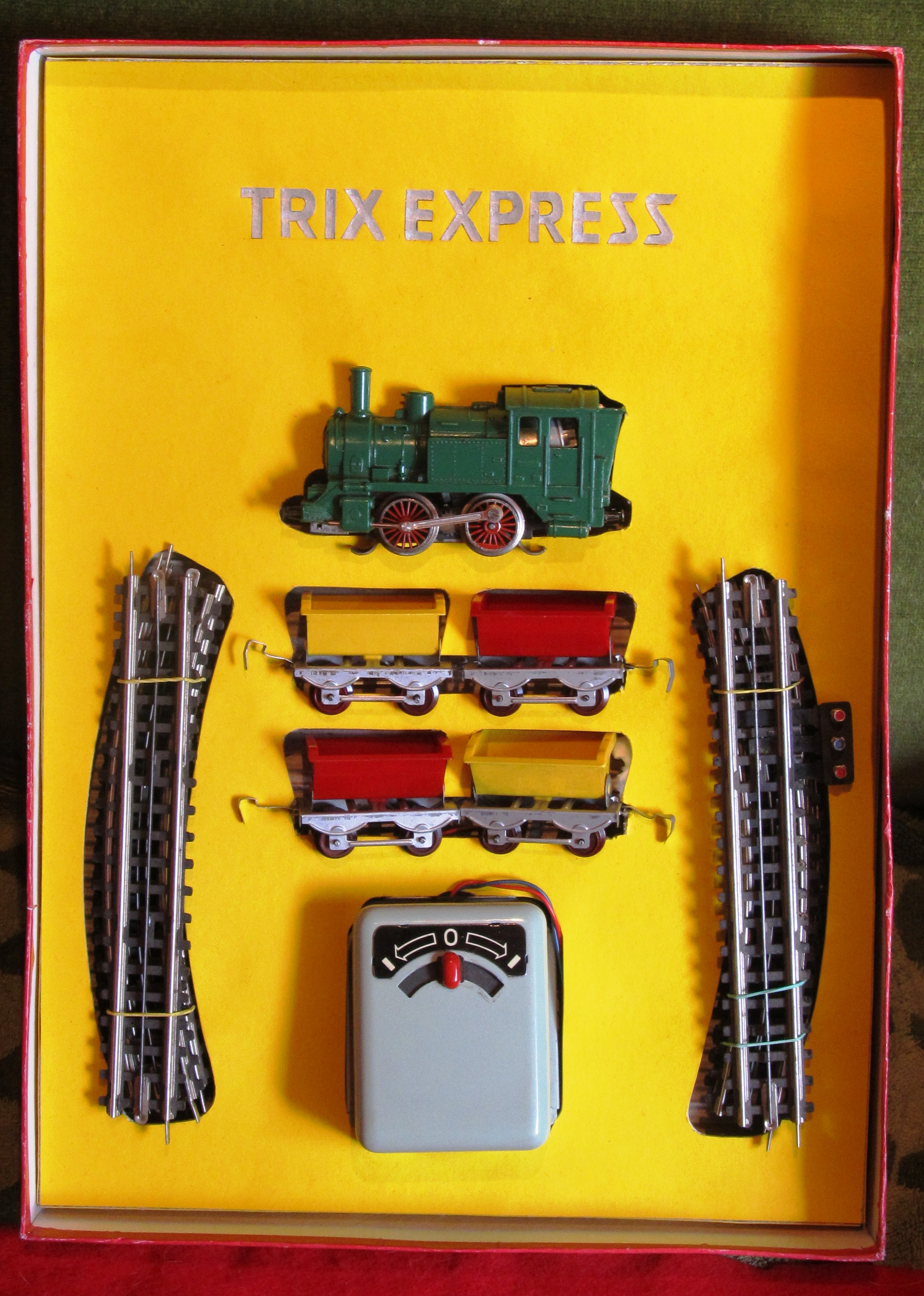 Trix Express, Sandbahn Packung, beliebtes Sammlerobjekt aus den 1960er Jahren